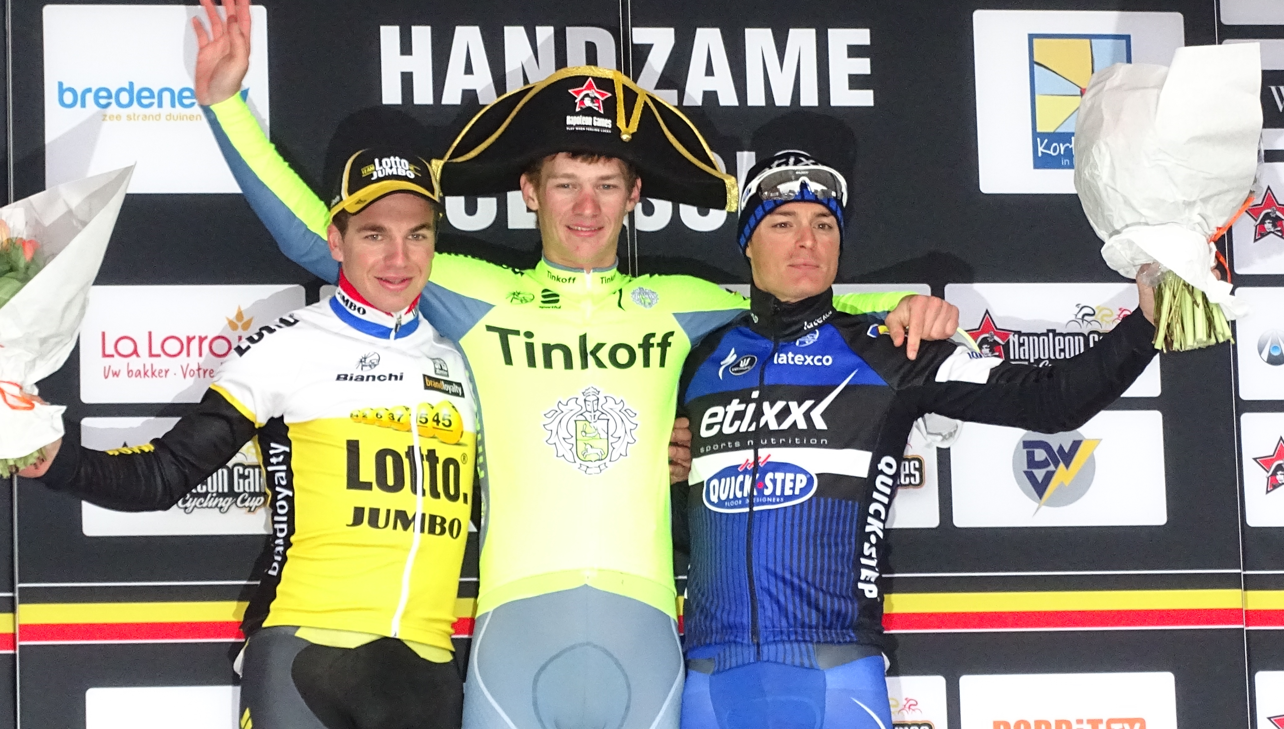 Reportage réalisé le vendredi 18 mars à l'occasion de l'arrivée de la Handzame Classic 2016 à Bredene (Kortemark), Belgique.